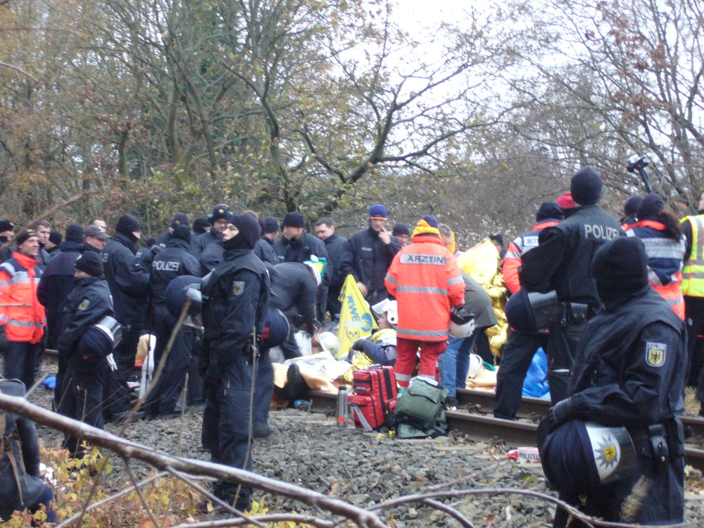 Hitzacker: Die Pyramide der Bäuerlichen Notgemeinschaft steht fest.